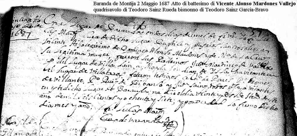 Baranda de Monija, 2 maggio 1687. Atto di battesimo di Vicente Alonso Mardones Vallejo, padre di Maria Alonso Mardones Diez, e quadrisavolo di Teodoro Sainz Rueda il bisnonno di Teodoro Sainz Garcia-Bravo.